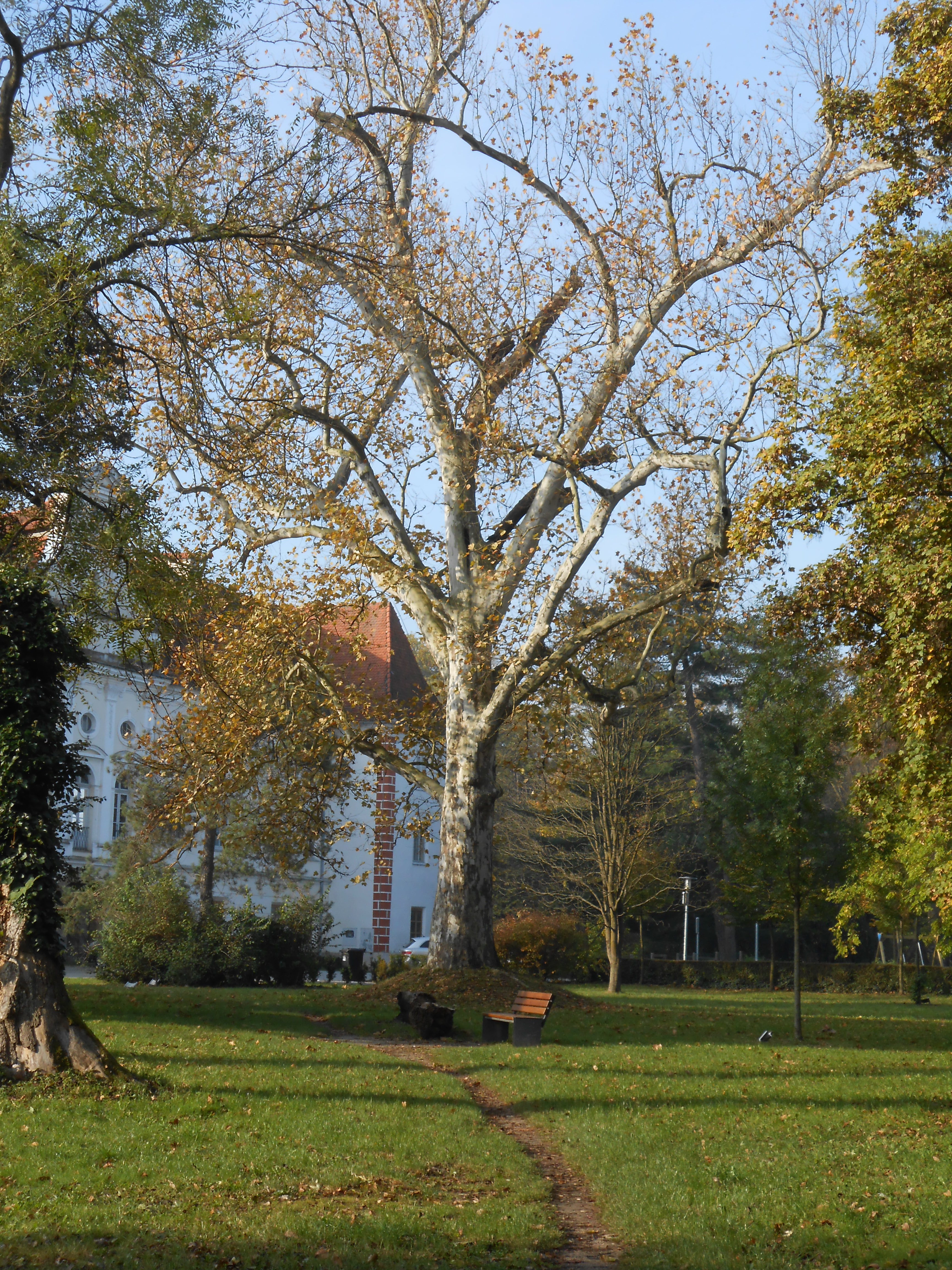 Platana na severozahodnem oglu gradu sodi med najstarejša drevesa v parku.